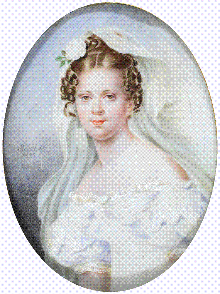 Баронесса Мария Дмитриевна Шеппинг, урож. Черткова (1799-1874), с 1822 года жена барона О. Д. Шеппинга.